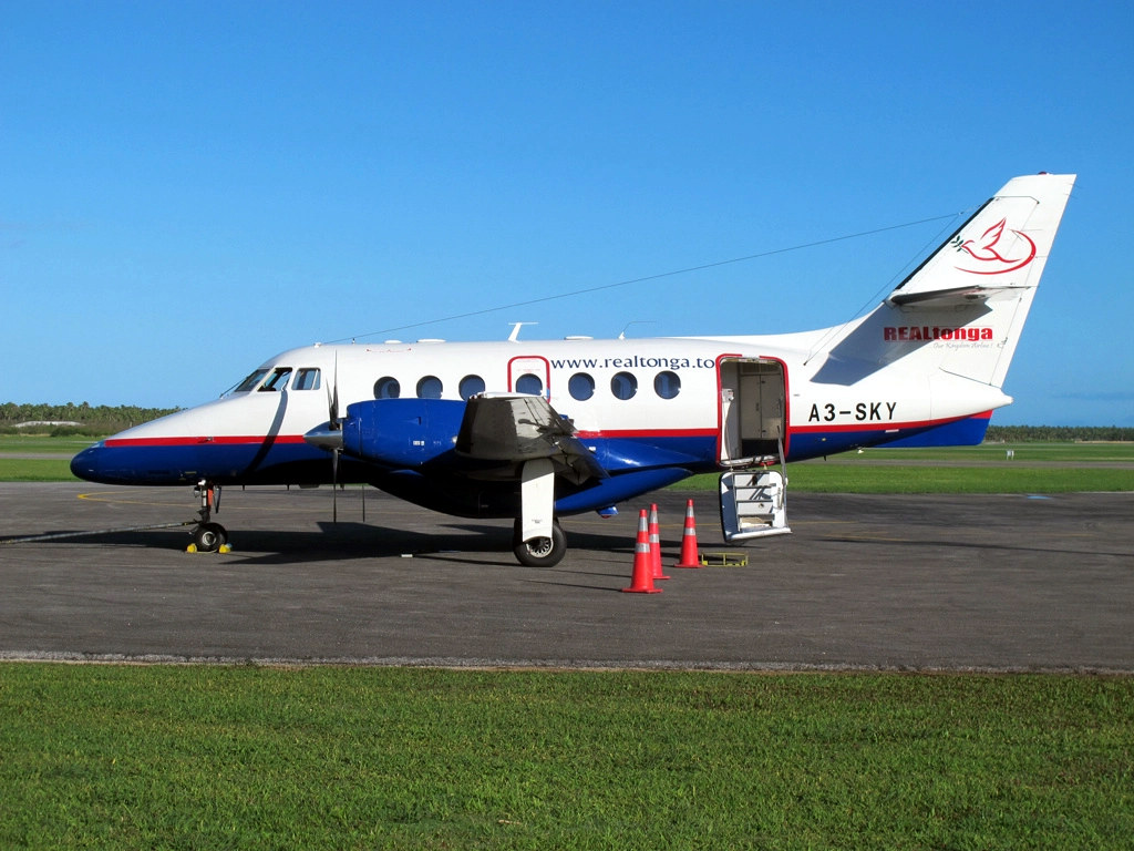 Real Tonga British Aerospace BAe-3201 Jetstream Super 31 A3-SKY Nuku'alofa / Fua'amotu International (TBU) Tonga - May 30, 2016